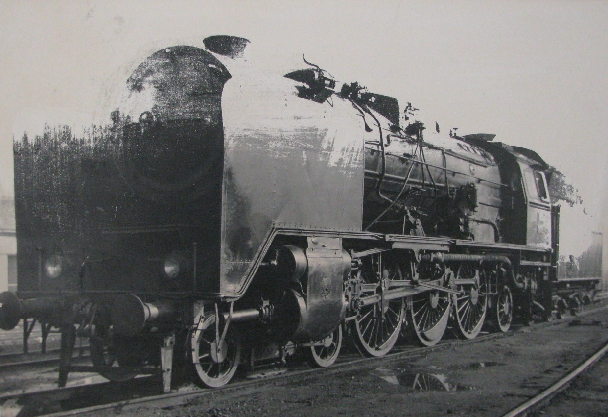 Parna lokomotiva JŽ serije 05. Fotografija iz Tehničkog muzeja u Zagrebu